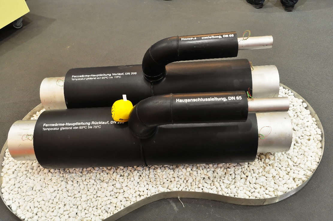 Haus & Energie 2015 in Sindelfingen.